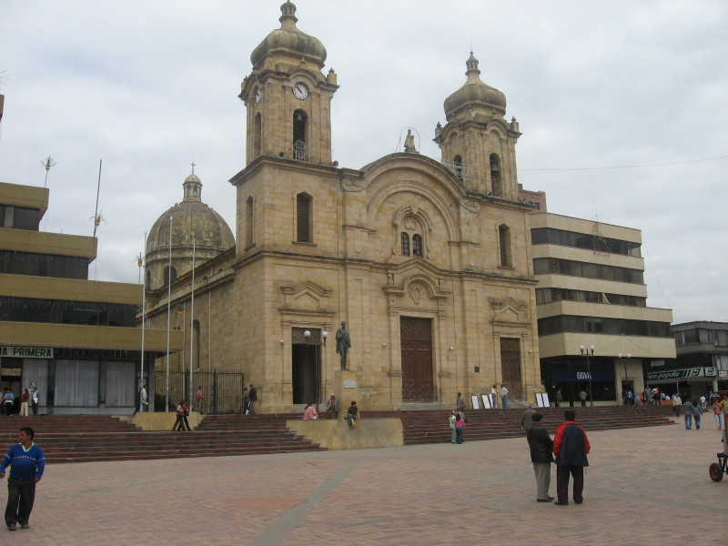 Catedral de Duitama Boyaca - Colombia.